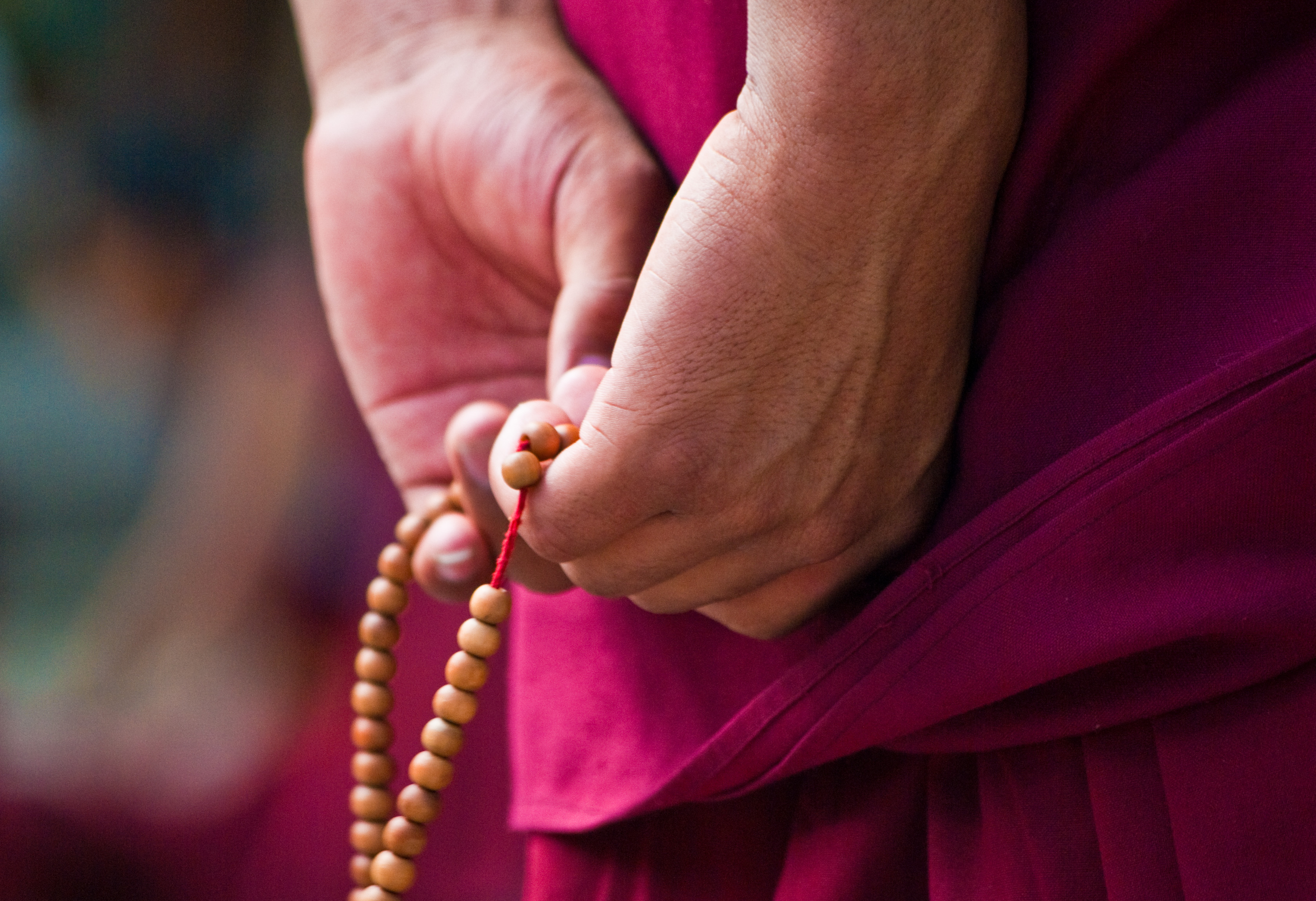 Un moine bouddhiste au monastère de Sera avec un chapelet